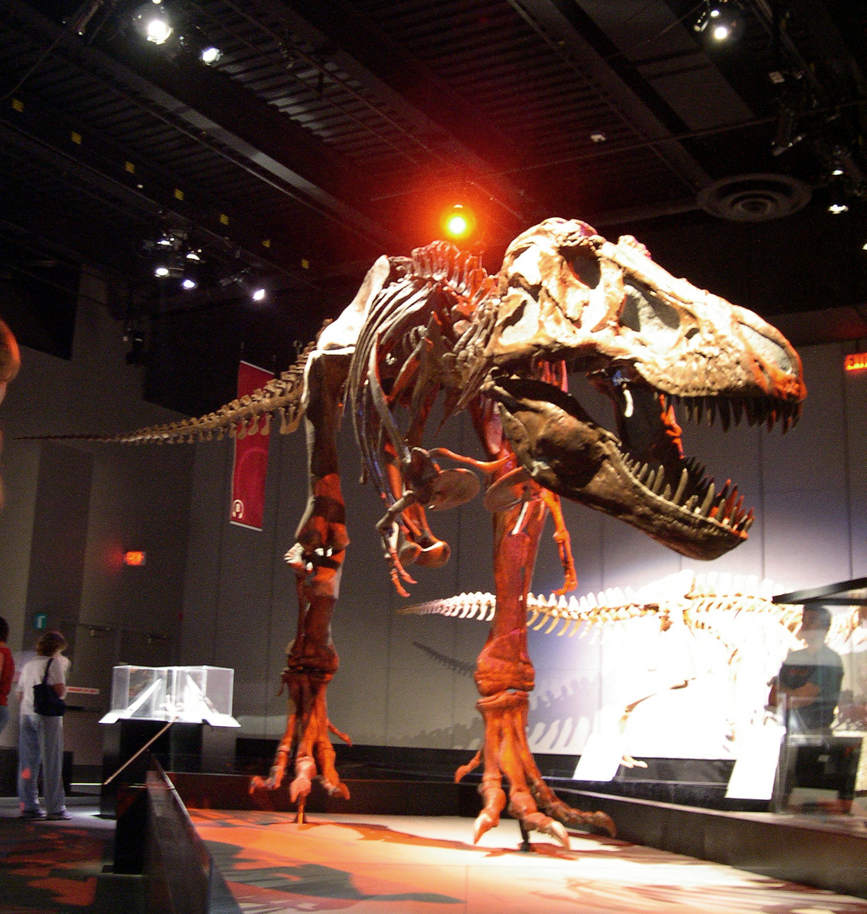 Tyrannosaurus skeleton.